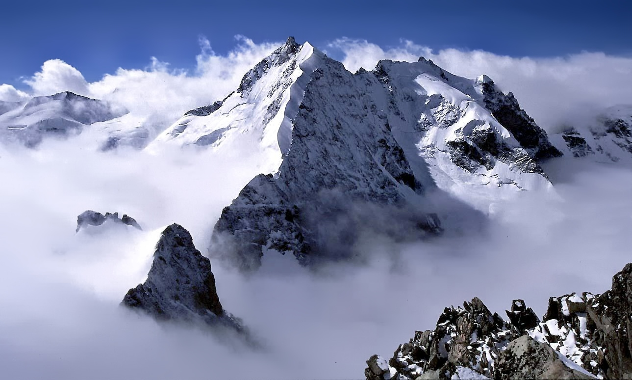 Piz Bernina, Eastern Alps